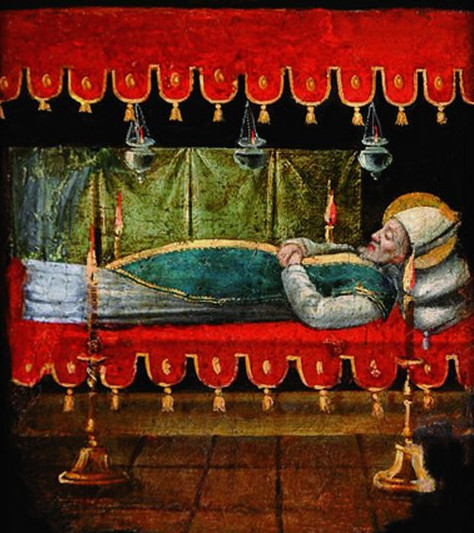 Otwarty sarkofag świętego Mikołaja. XV-wieczna tempera na drewnie anonimowego malarza. Bazylika świętego Mikołaja w St-Nicolas-de-Port.